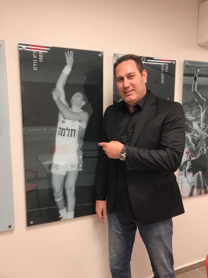 גיא גודס מצטלם לצד תמונתו במדי הפועל חיפה